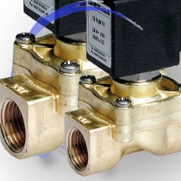 Zawory membranowe PressMann ze strony